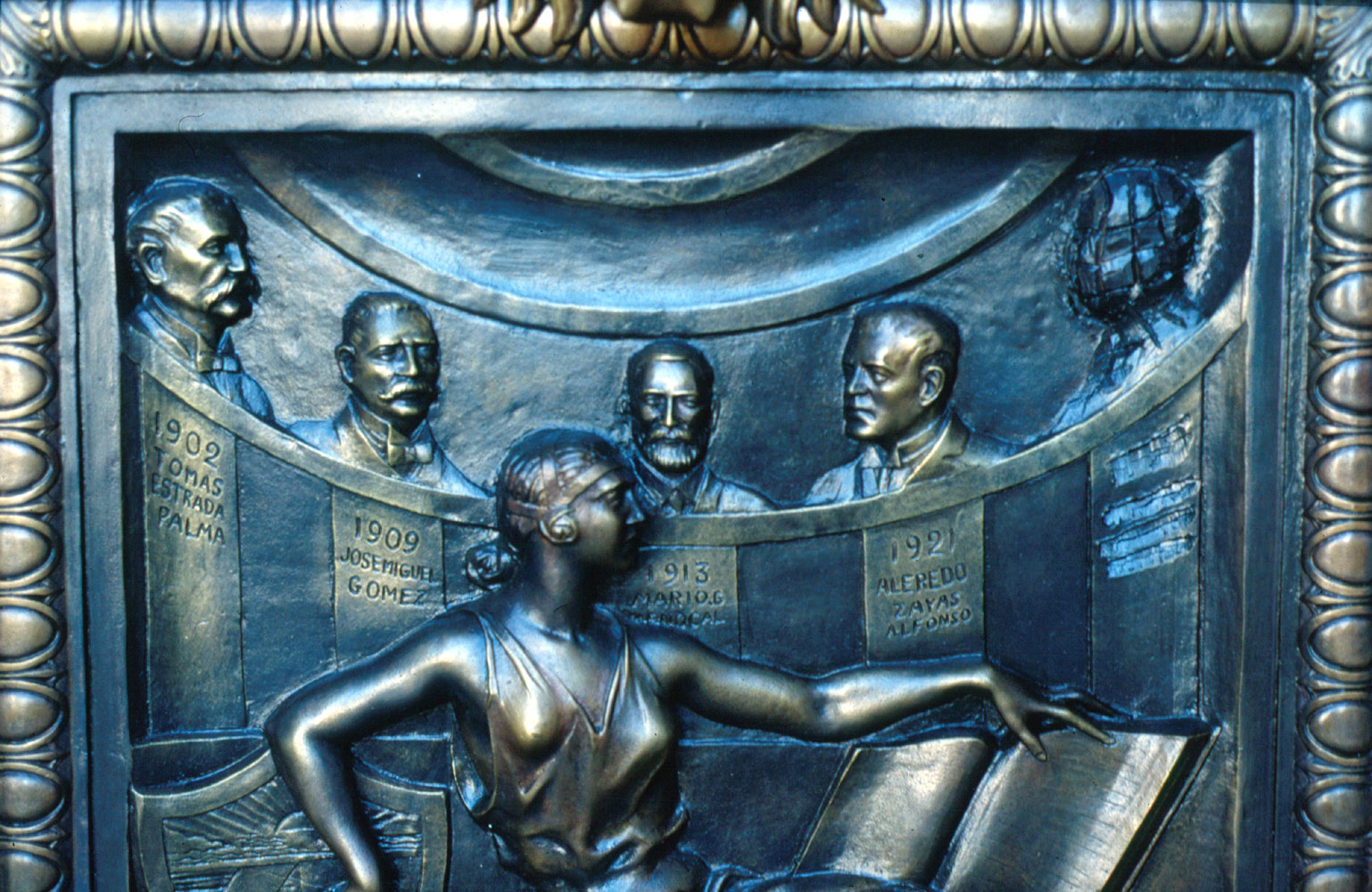 Präsidenten Kubas, Foto eines Teils des Portals des Kapitols von Havanna